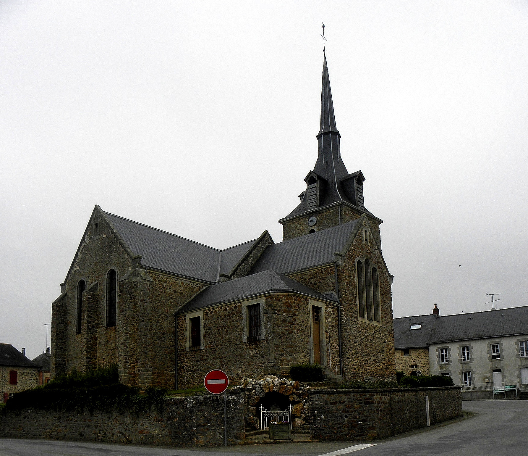 Église de la Sainte-Trinité de Beaulieu-sur-Oudon (53). Chevet et flanc sud.